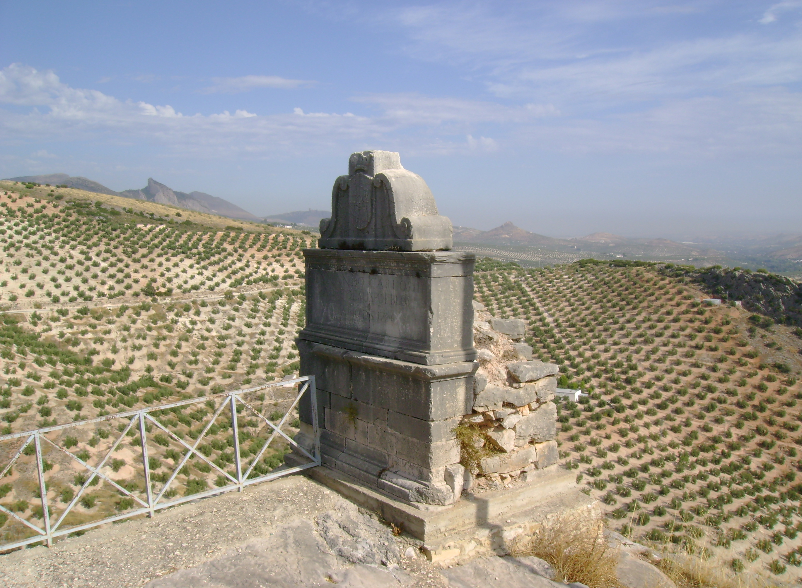 Vítor de Carlos III en La Escaleruela, en el Cerro Veleta en la Zona Patrimonial de Otíñar (Jaén)